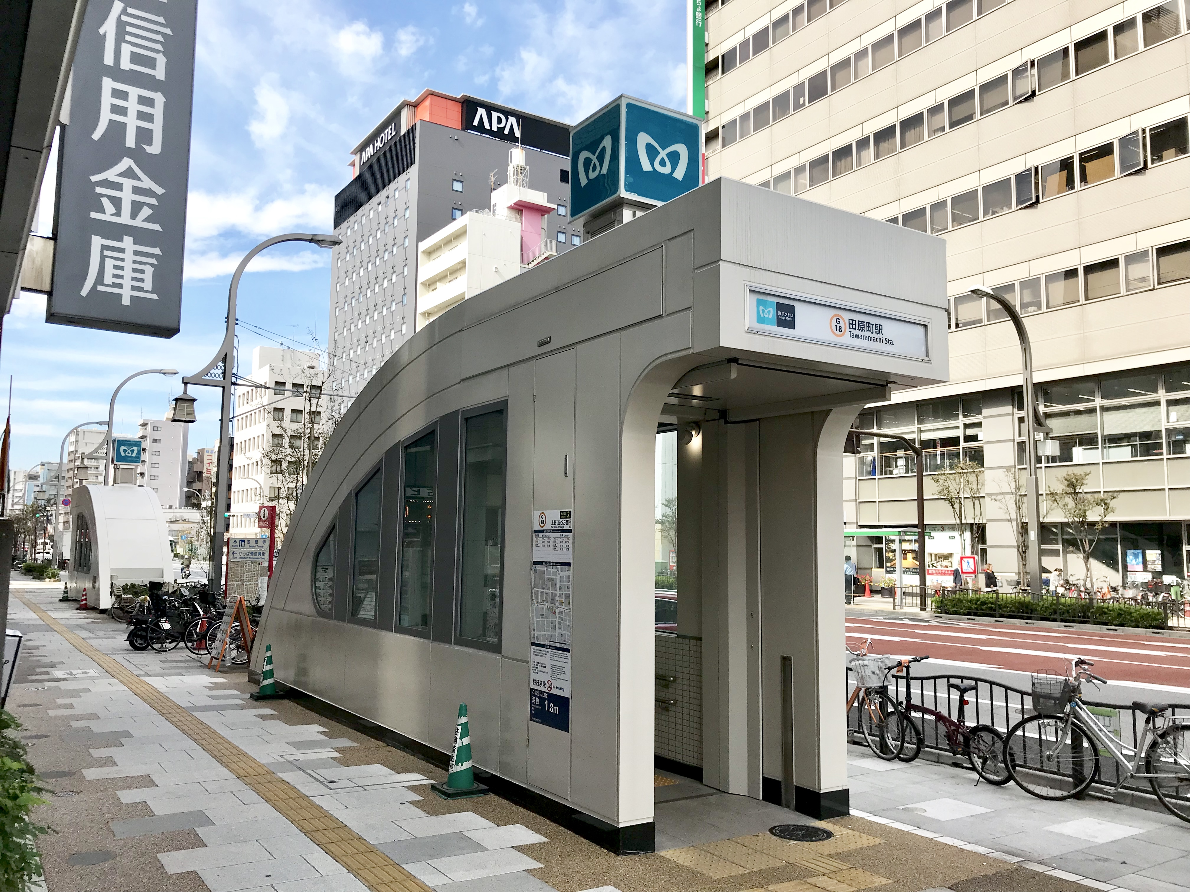 東京メトロ銀座線田原町駅2番出入口（リニューアル後）